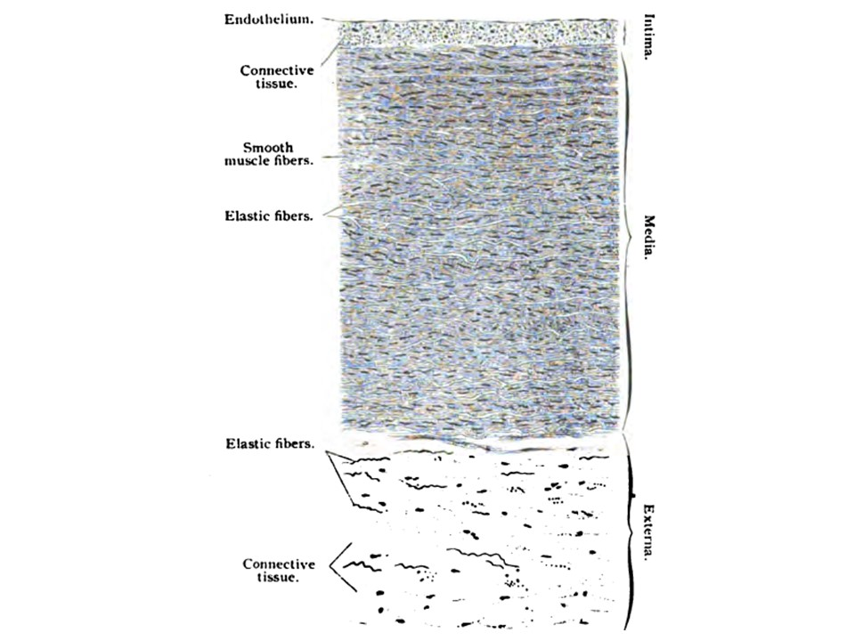 Struttura microscopica dell'aorta toiracica